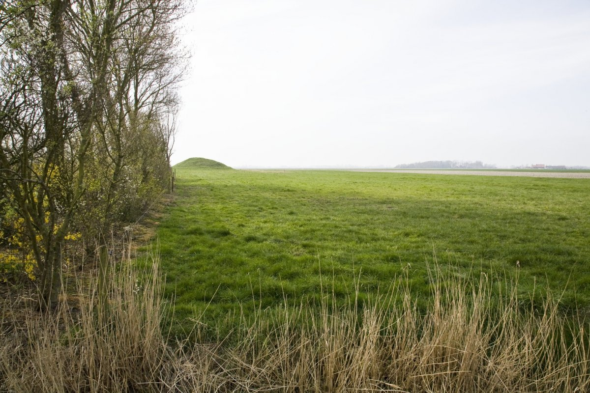 Vliedberg aan de Perduinsweg, Buttinge/Grijpskerke.